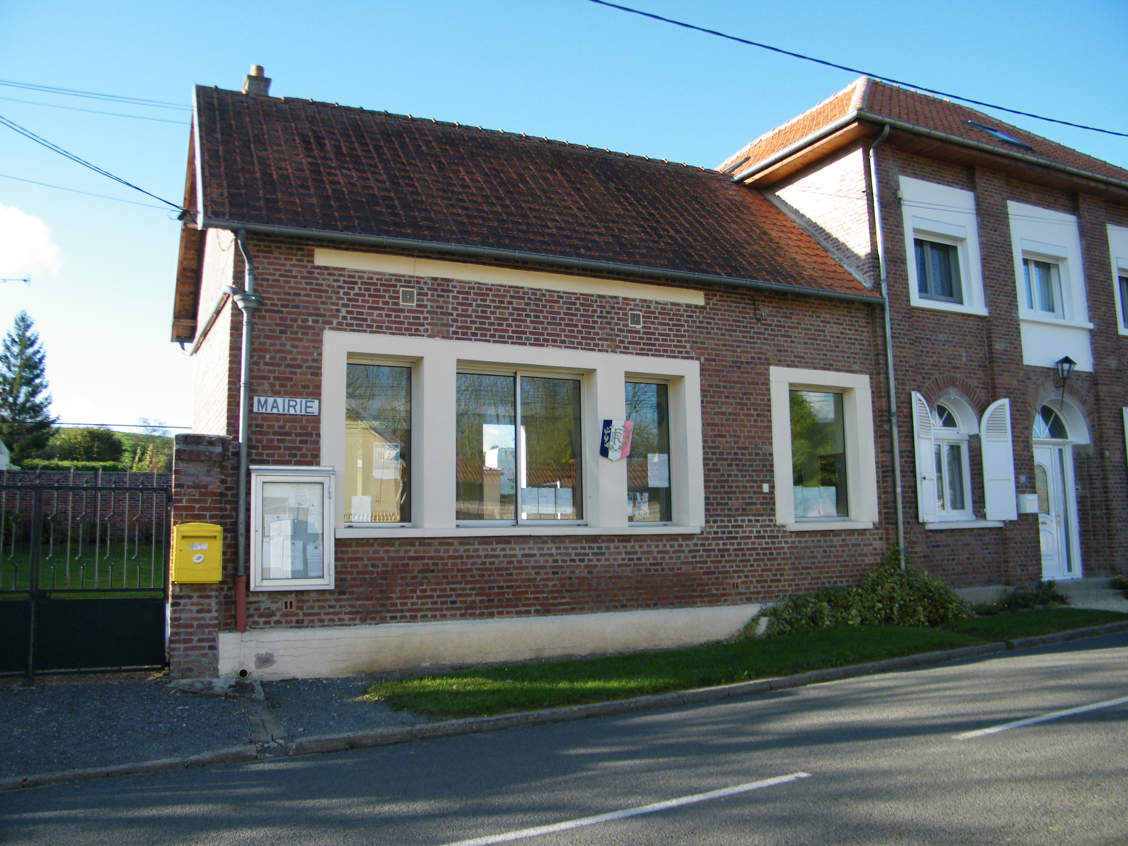 Mairie-école.